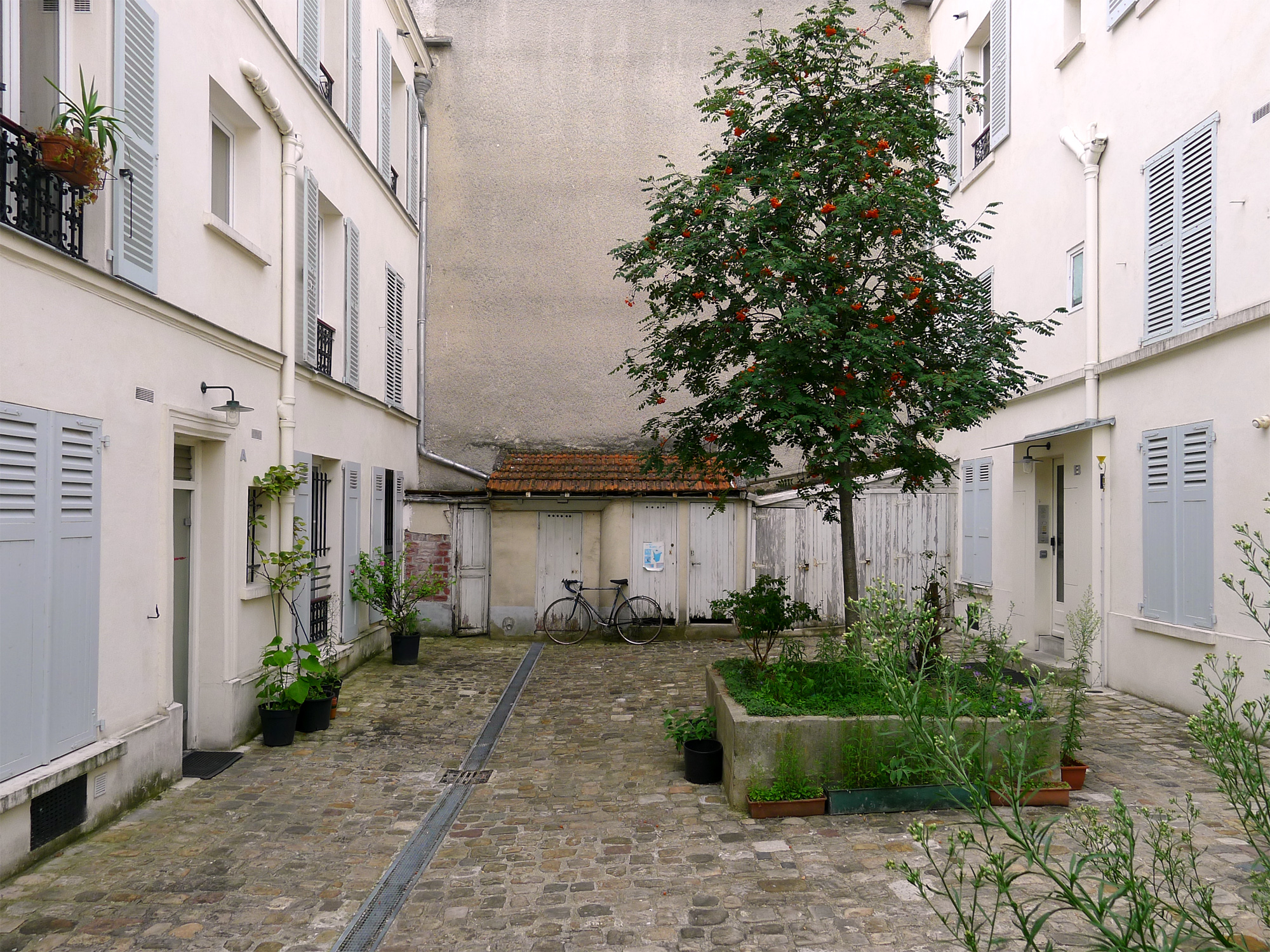 Passage Boiton - Paris XIII